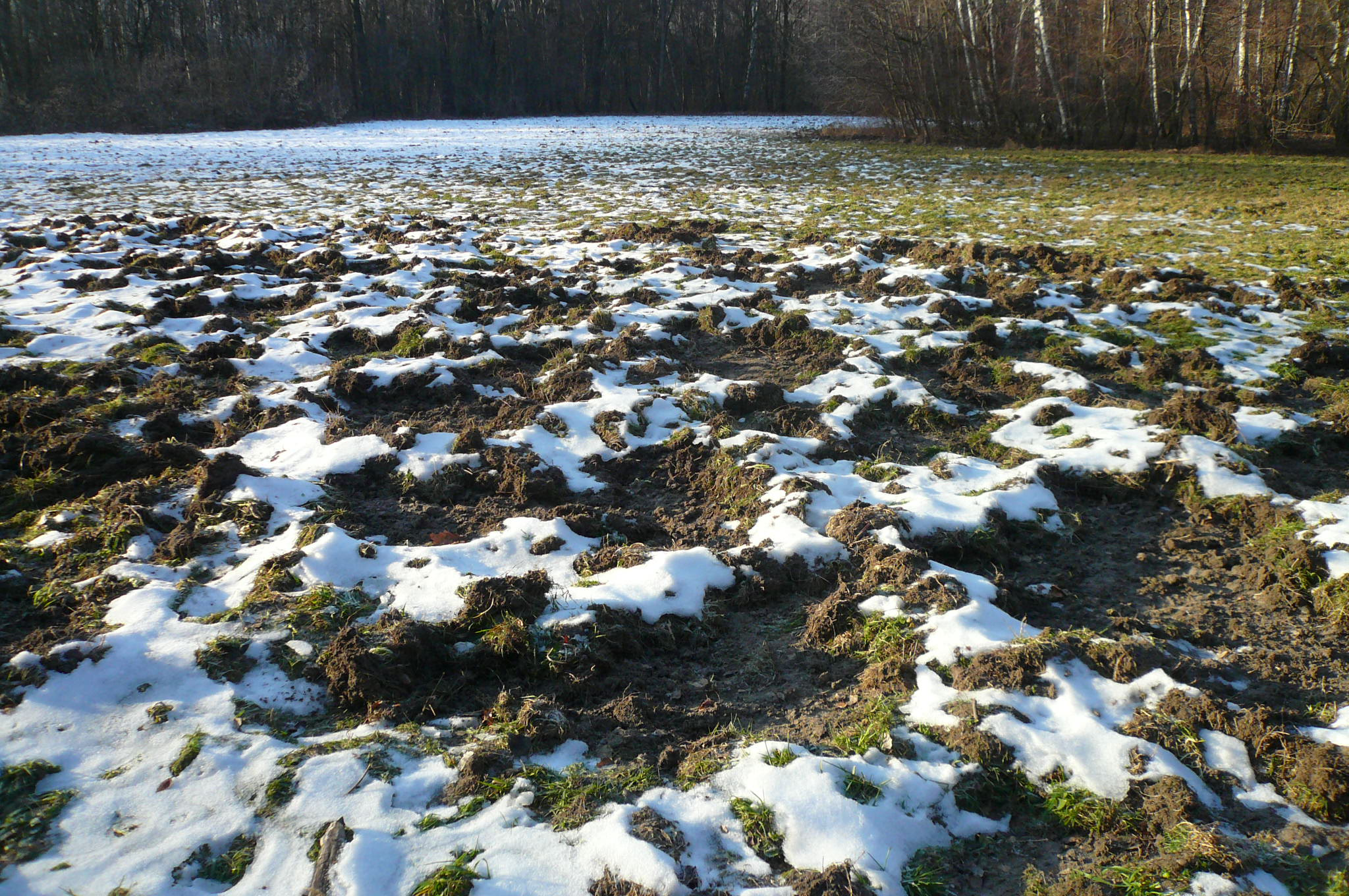 Zbuchtowana (zryta) przez dziki łąka. Las Bemowski